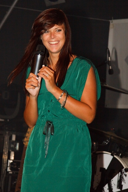 Jennifer Braun - Unser Star für Oslo.